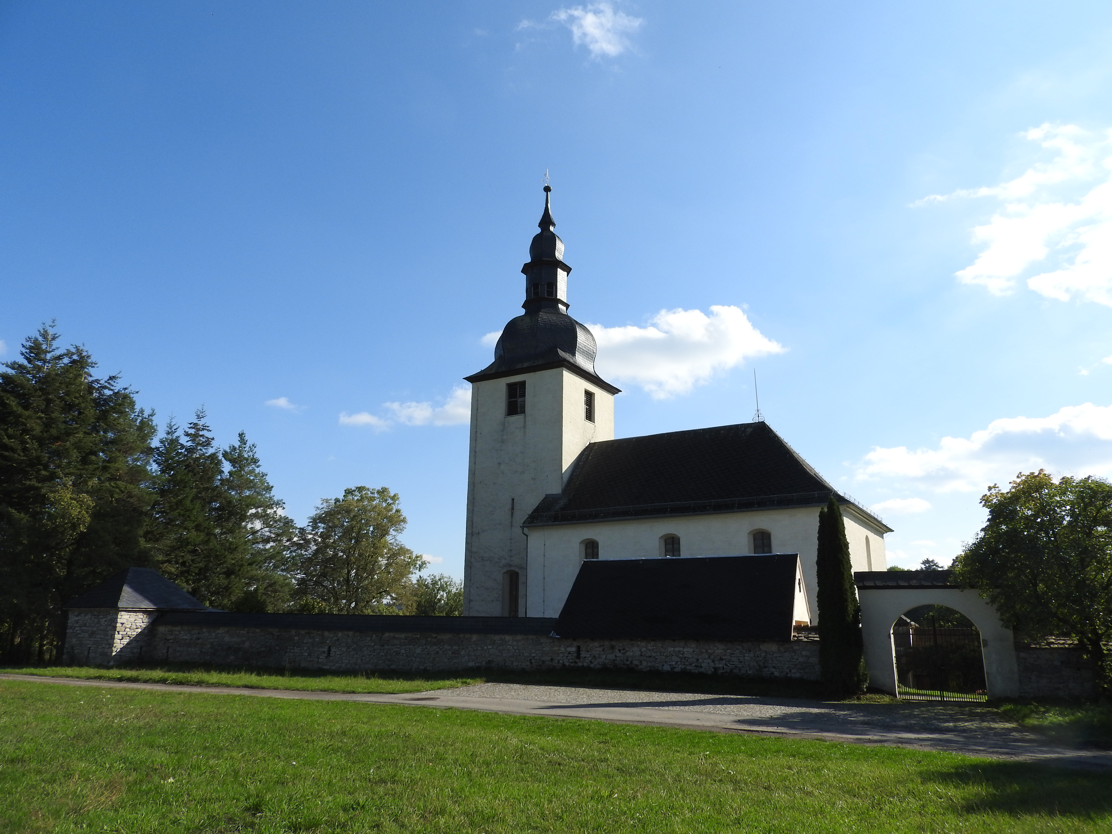 Kirche von Göschitz in Thüringen